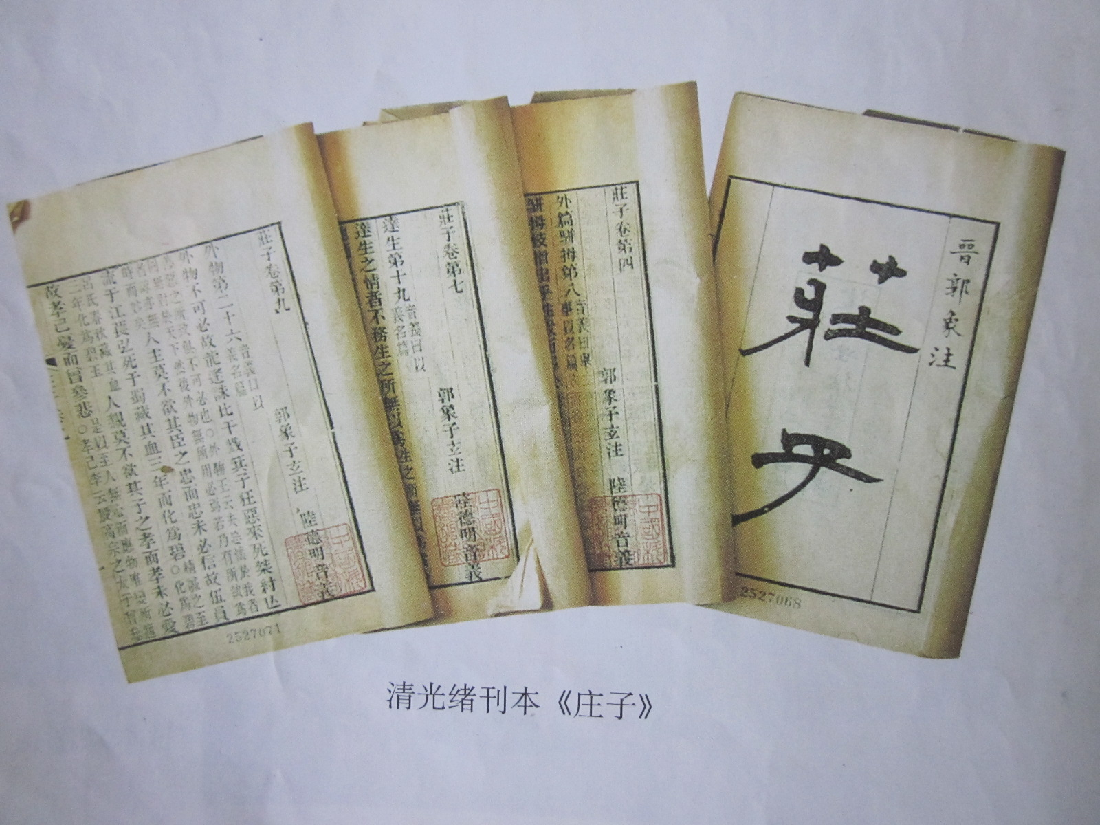 《庄子》，清朝光绪年间刊印本。